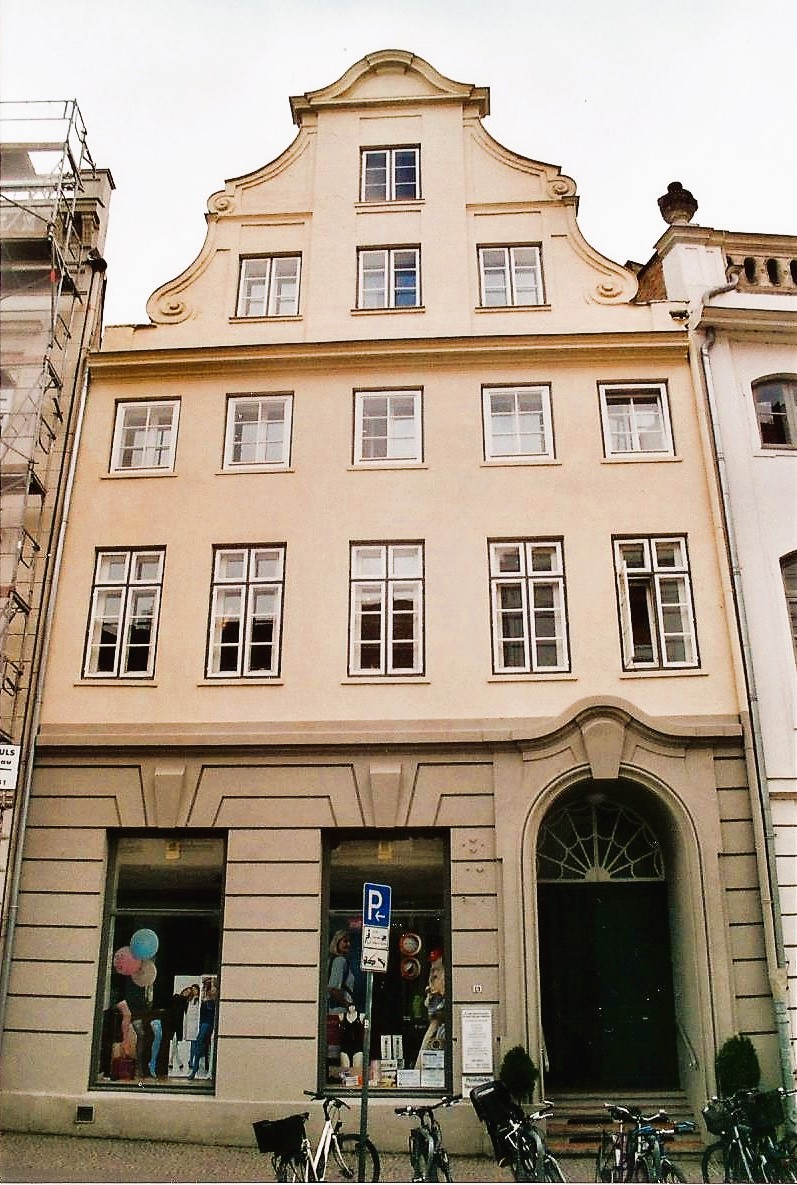 ehemaliges Wohn- und Geschäftshaus von Eduard Rabe, Königstrasse 19, Lübeck